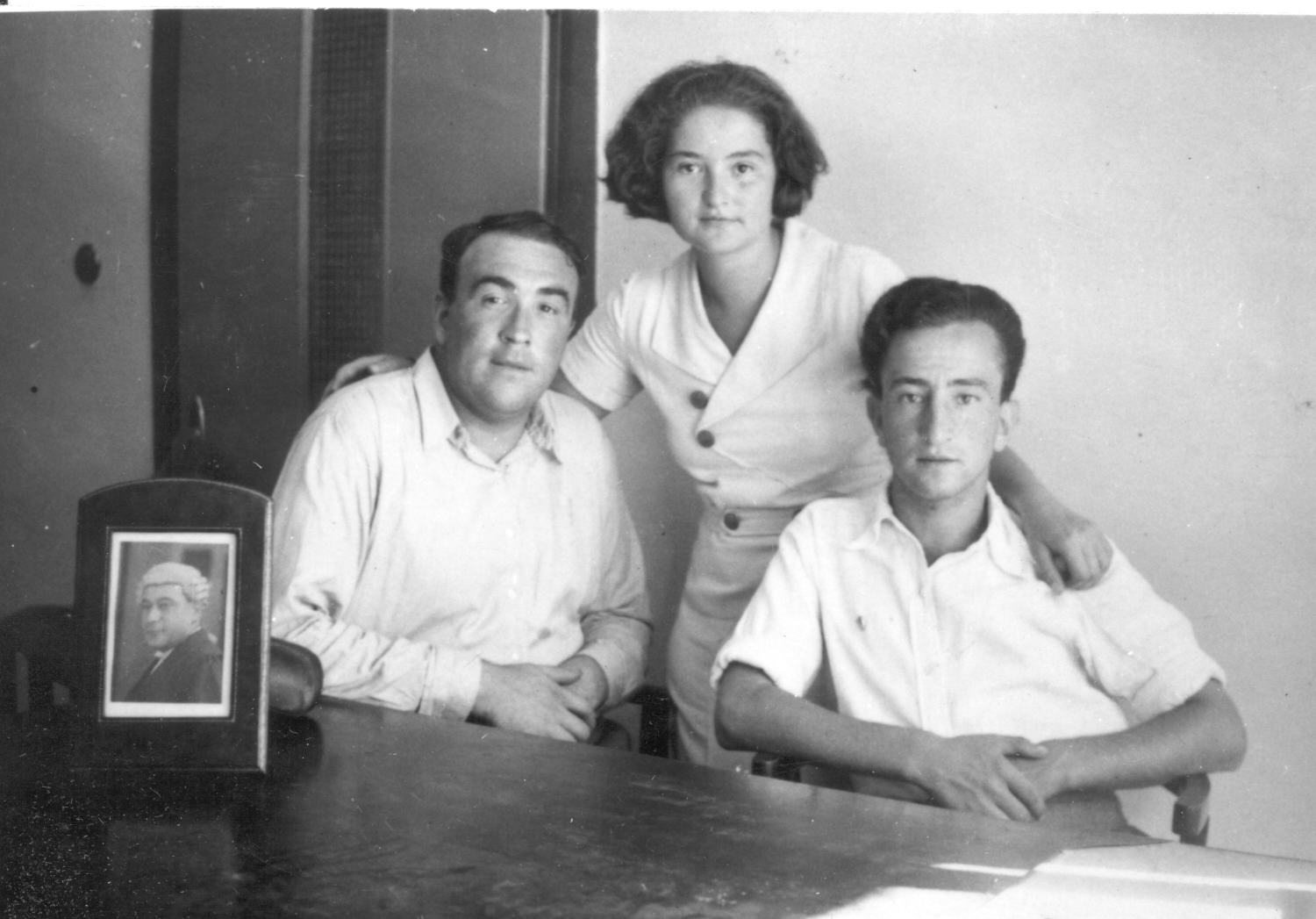 "סוניה אחימאיר עם אברהם סטבסקי, משמאל, צבי רוזנבלט, מימין לאחר שחרורם מן הכלא. על השולחן דיוקנו של סנגורם הוראס סמואל." 01/07/1934